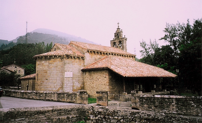 Bárcena de Pie de Concha - Iglésia dels Sants Cosme i Damià - Segle XII